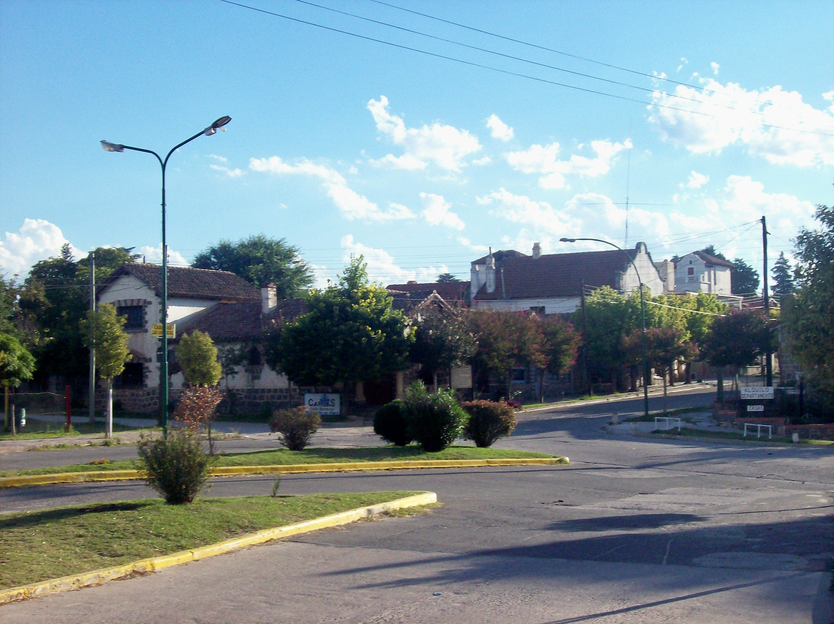 Barrio de San Antonio, en Valle Hermoso, provincia de Córdoba, Argentina. Foto tomada de E a O, desde calles Independencia y Eva Perón